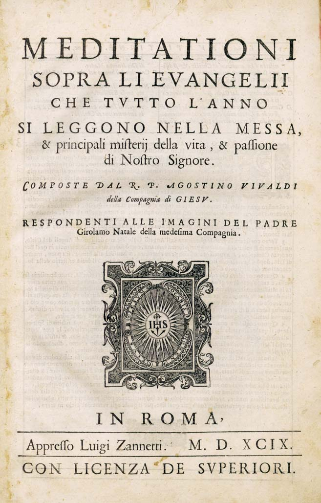 Edition de Luigi Zannetti en 1599, malgré qu'il ne possédait pas l'autorisation papale (décernée en 1593 à Martinus Nutius par le pape Clément III). Trad. à l'italien de Agostino Vivaldi.